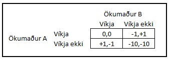 Myndin er af tölulegum ávinningi tveggja ökumanna í hænsnaslag. Myndin var þannig gerð til þess að dýpka skilning á tölulegum ávinningi tveggja leikmanna í hænsnaslag.